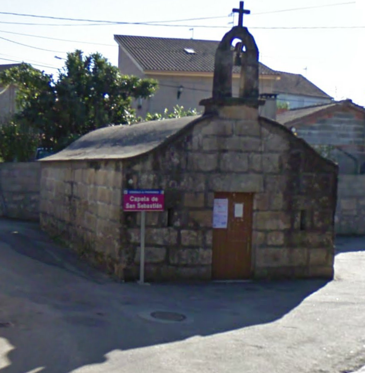 Capela de San Sebastián, O Souto, Xinzo, Ponteareas.